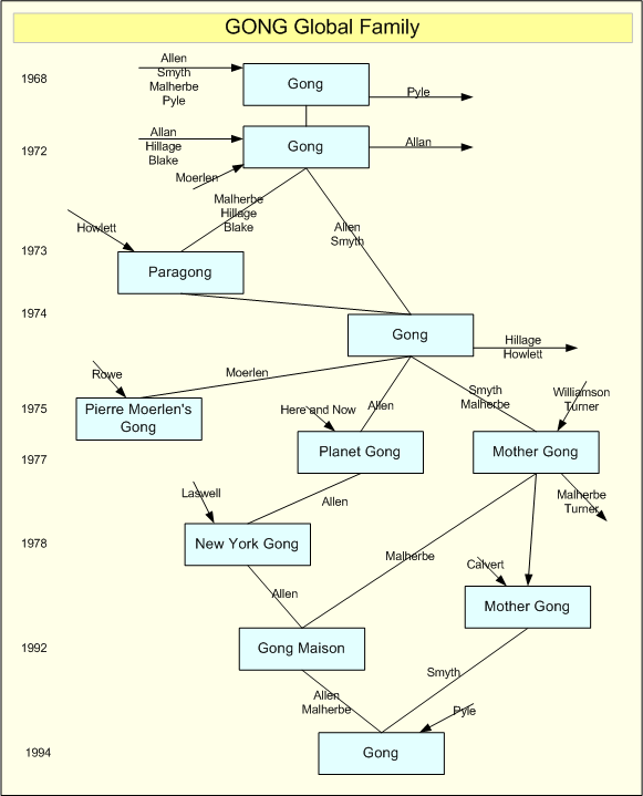 Eigen werk de Gong familie: de vele voorkomens van de band Gong